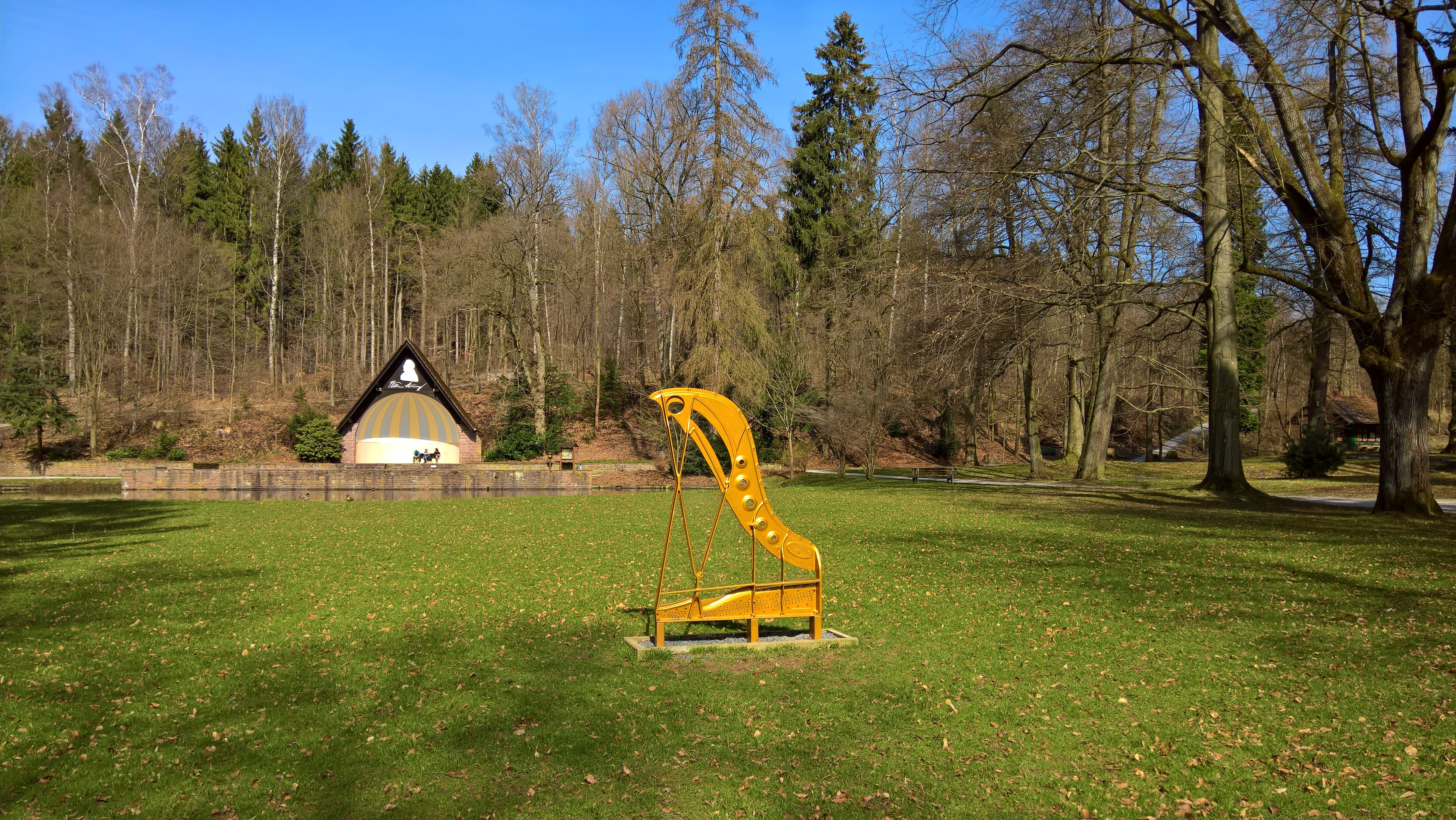 Steinway-Park, Seesen, Landkreis Goslar